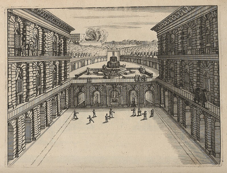 Original image description from the Deutsche Fotothek Architektur & Wasserförderung & Wasserkunst & Springbrunnen